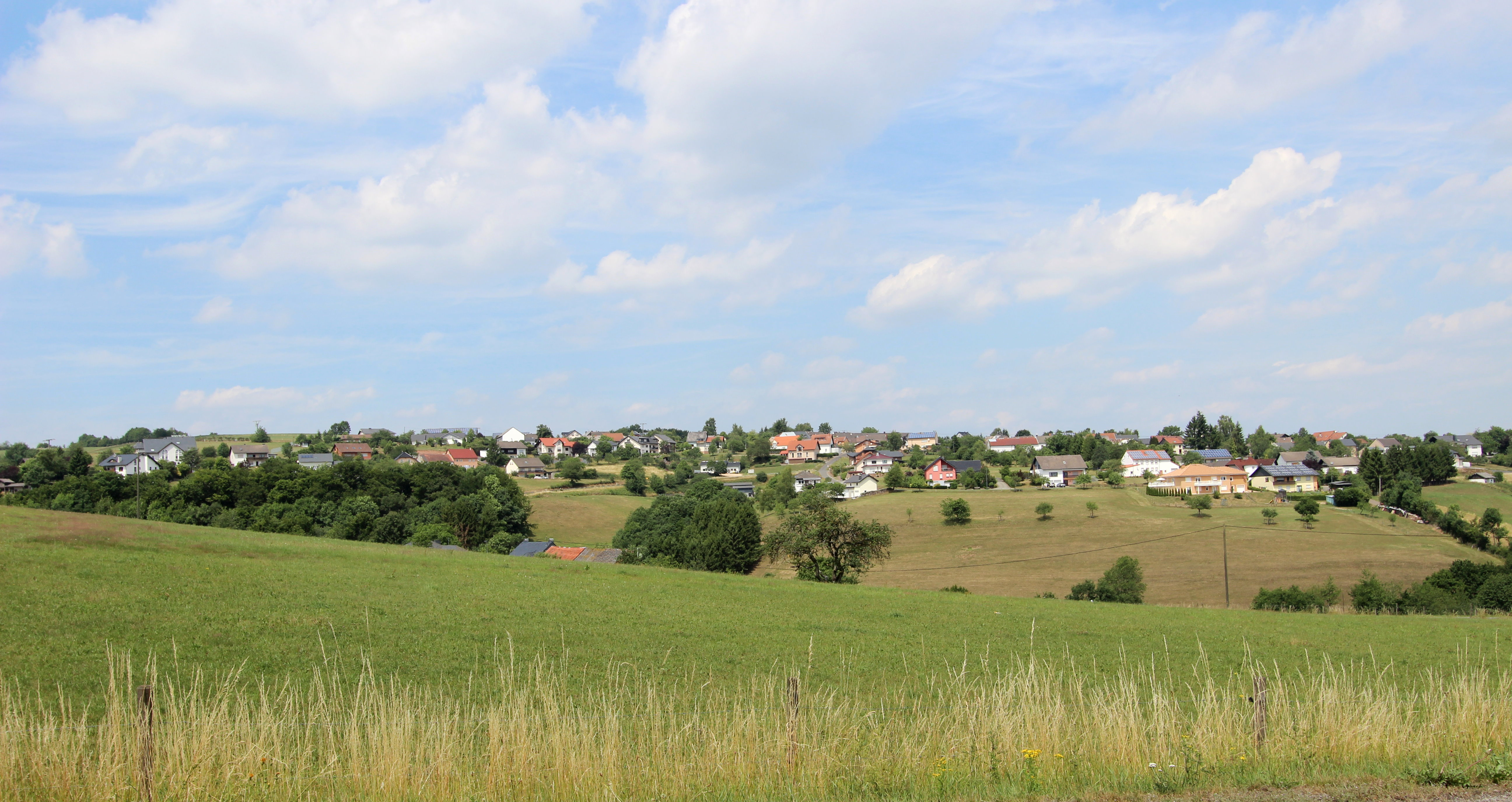 54597 Feuerscheid. An der L 33 in Richtung Nimshuscheid. Aufnahme von 2017.